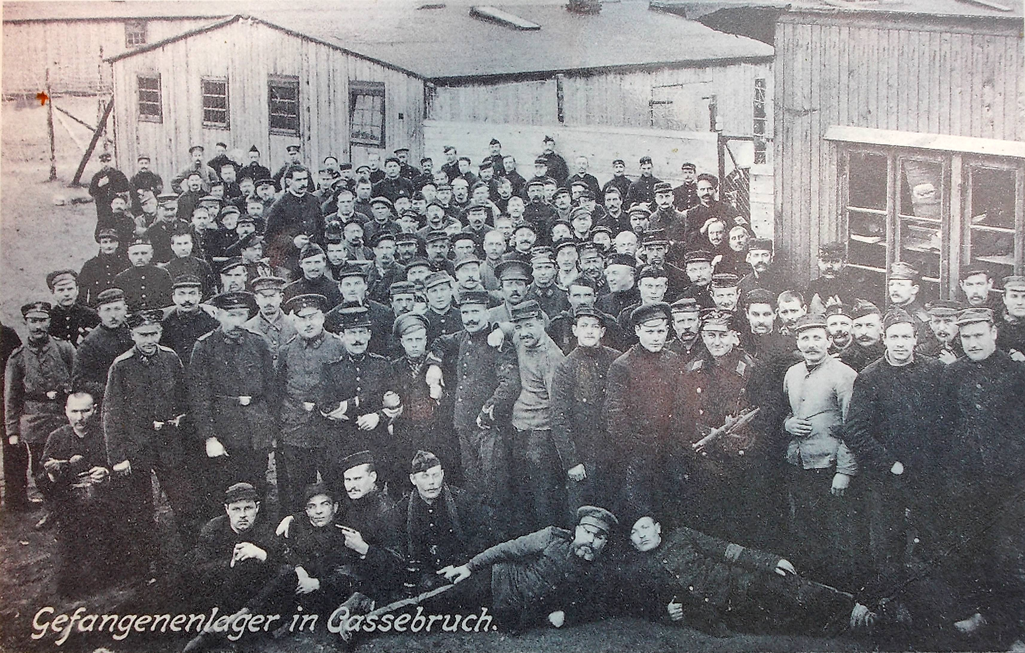 Foto von Gefangenen auf der Infortafel der Gedenkstätte zu einem Kriegsgefangenenlager in Kassebruch /Hagen im Bremischen